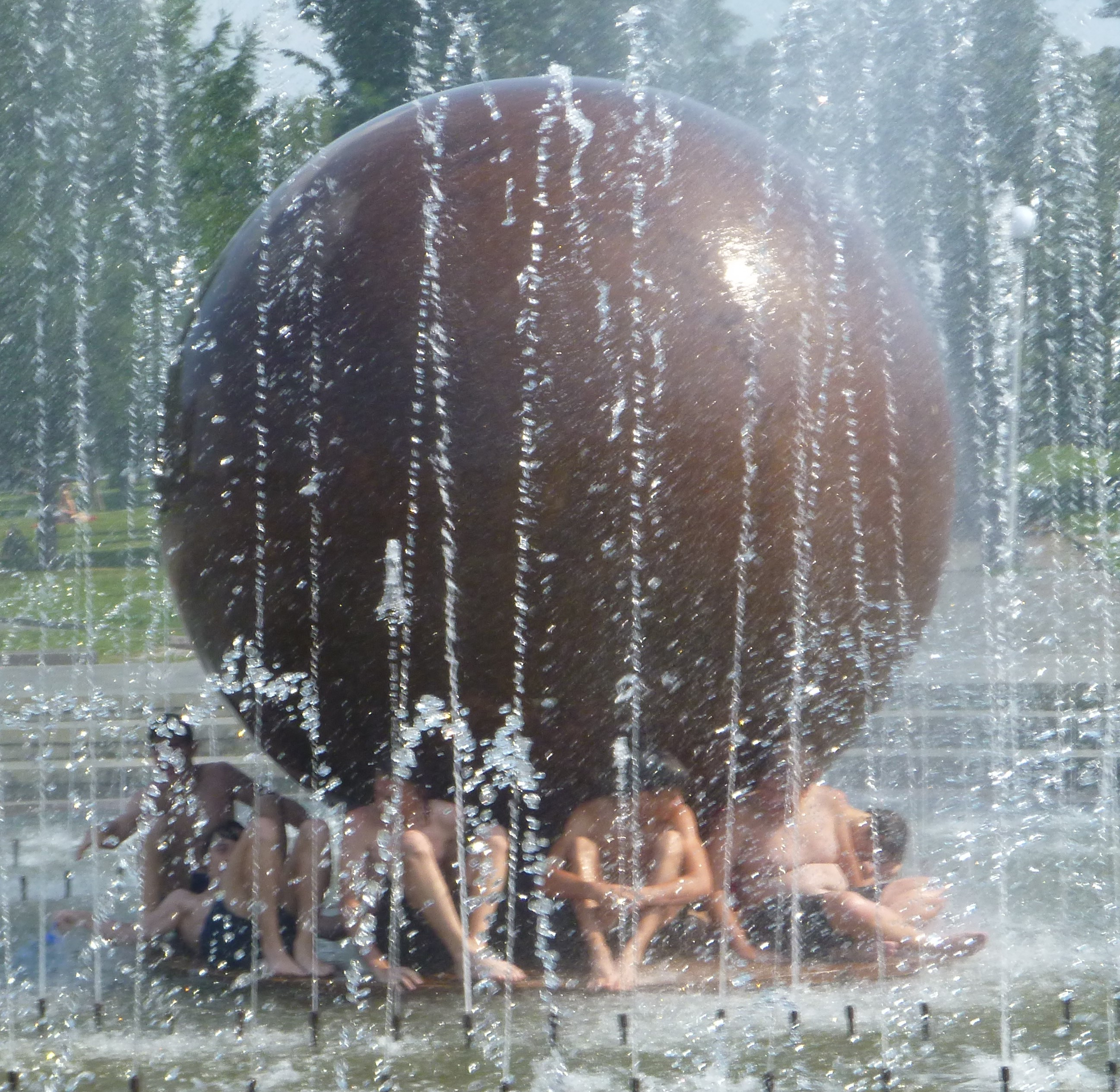 Живые скульптуры (подростки, севшие от жары) у фонтана Шар на Октябрьской площади Екатеринбурга 9 июля 2020 года